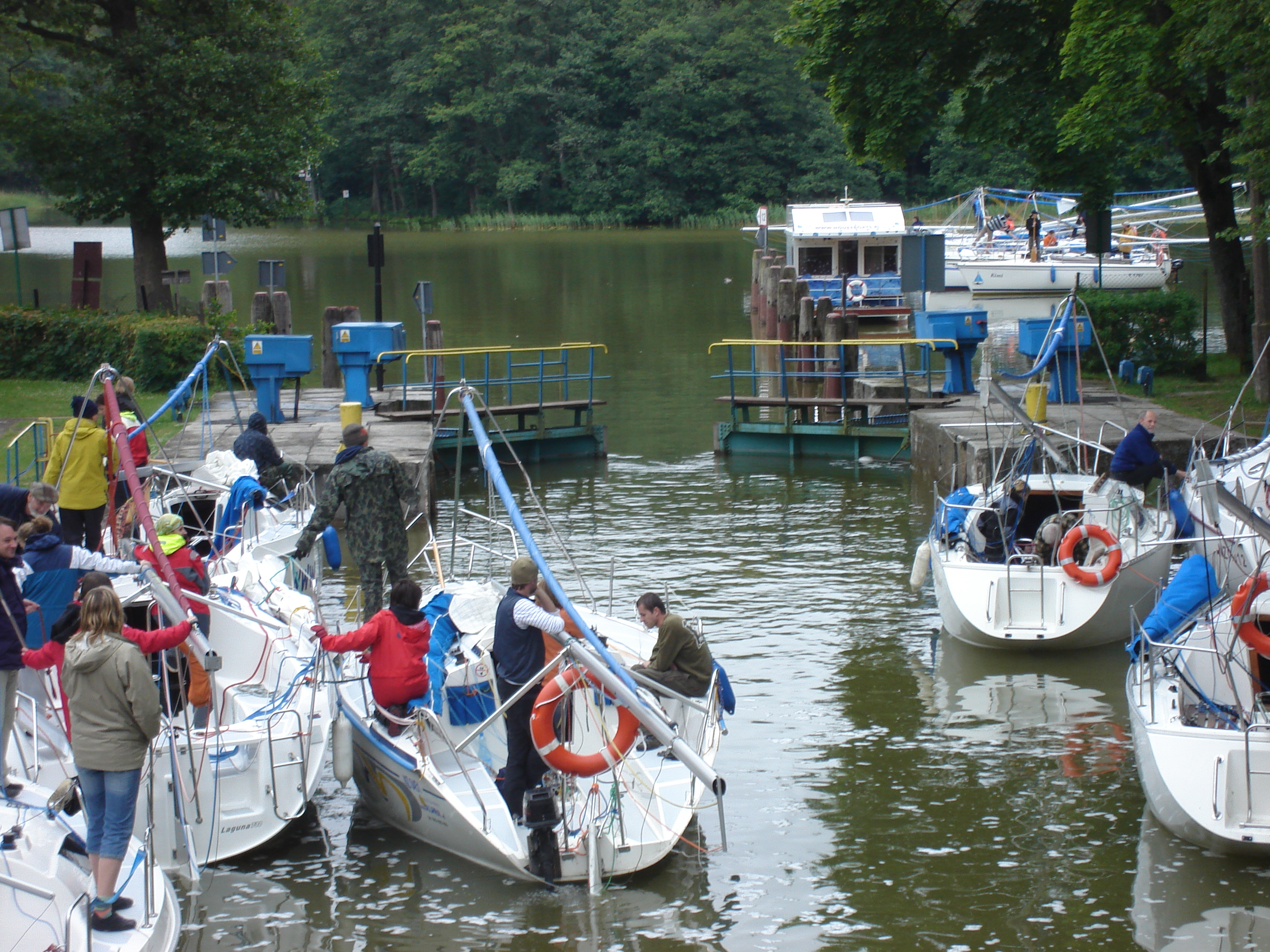 Śluza Guzianka. Otwieranie wrót śluzy.